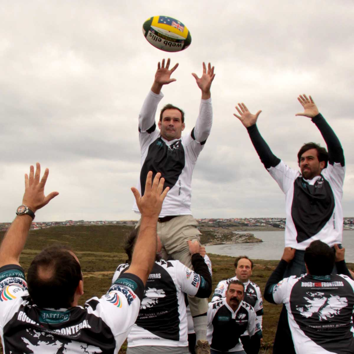 Durante mucho tiempo nos preguntamos ¿Cómo unir dos pueblos después de una guerra?, ¿cómo generar un evento superador que nos ayude a curar las heridas aún abiertas? ¡Hagamos un partido de Rugby!... fue la respuesta que encontramos en el deporte que habíamos jugado toda nuestra vida y que nos había formado con sus valores. Así, la historia marcará al domingo 13 de diciembre del año 2009 como la fecha a recordar. Se jugaba el primer partido en las Islas Malvinas y nacía la idea de compartir y transmitir los valores del rugby, demostrando que era posible construir una sociedad nueva, defendiendo, difundiendo y promocionando los valores universales, aquellos que nos enseñaron nuestros padres y abuelos y que el rugby lleva como bandera: el respeto, el autocontrol, el trabajo en equipo, la solidaridad, la Paz y el amor.